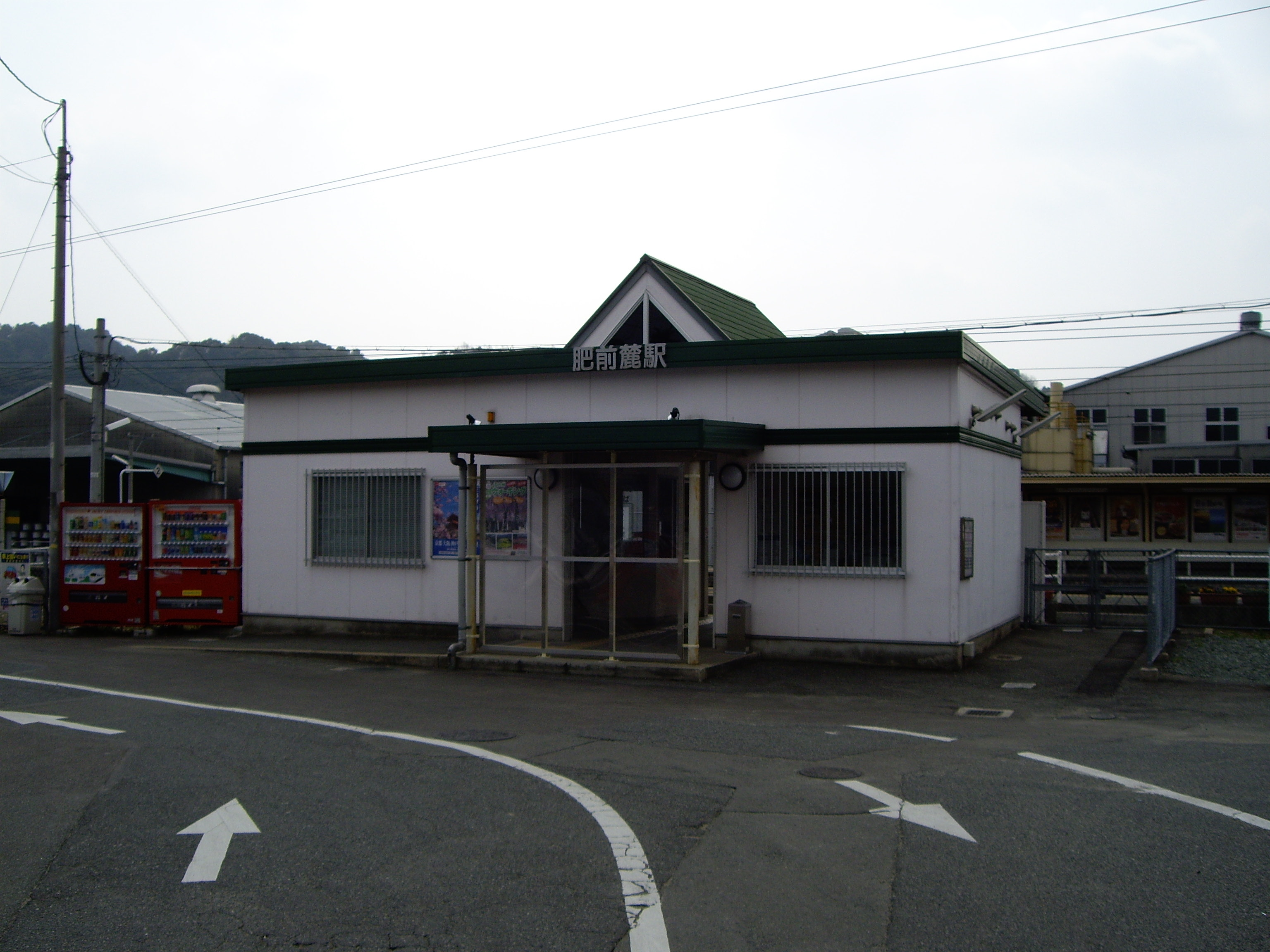 Hizen-Fumoto Station(肥前麓駅)